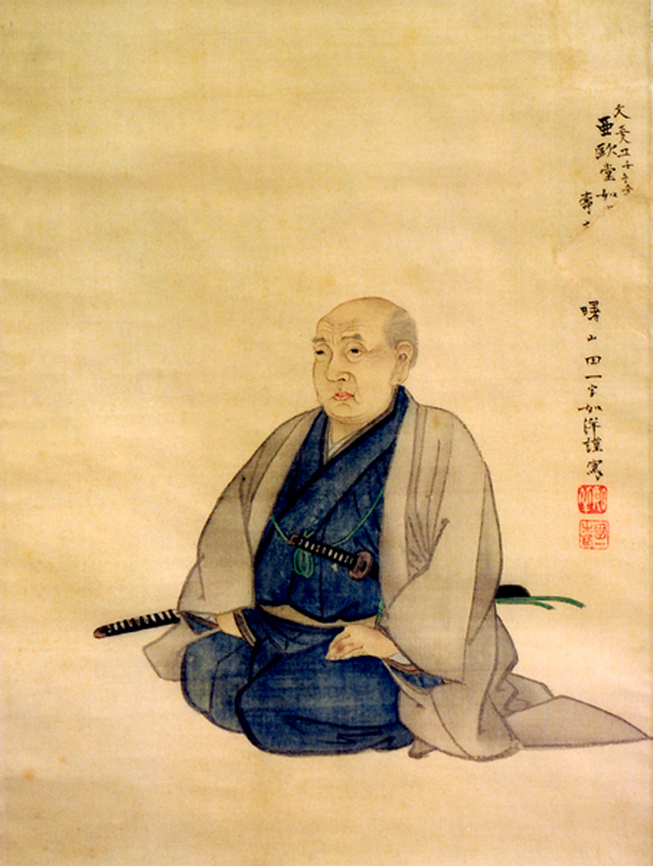 亜欧堂田善 遠藤田一筆